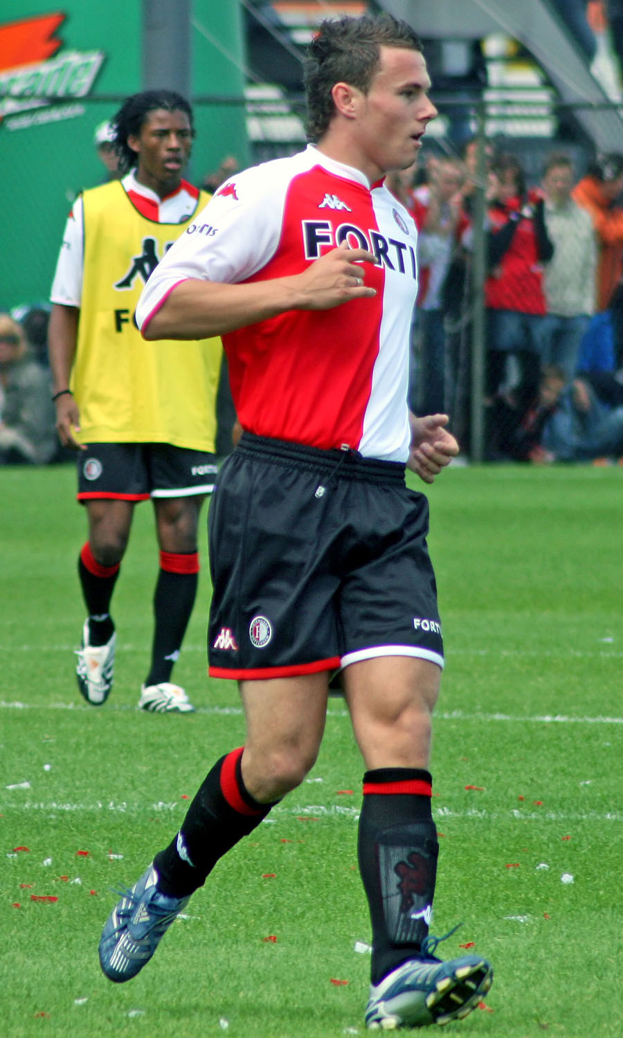 Jordy Buijs (Feyenoord)